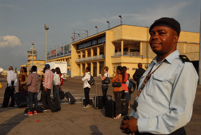 Aéroport de Ngjili, embarquement CAA